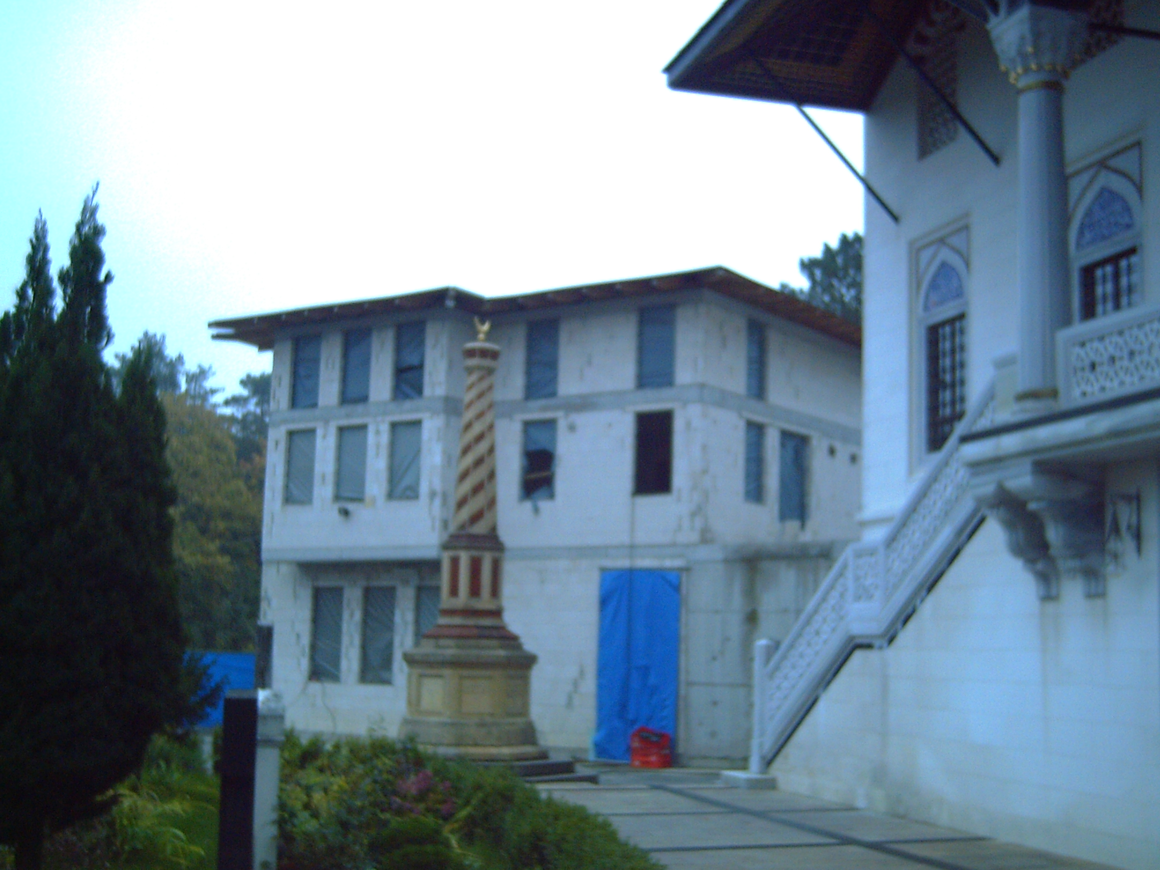 Kulturelles Zentrum (Rohbau) Oktober 2009